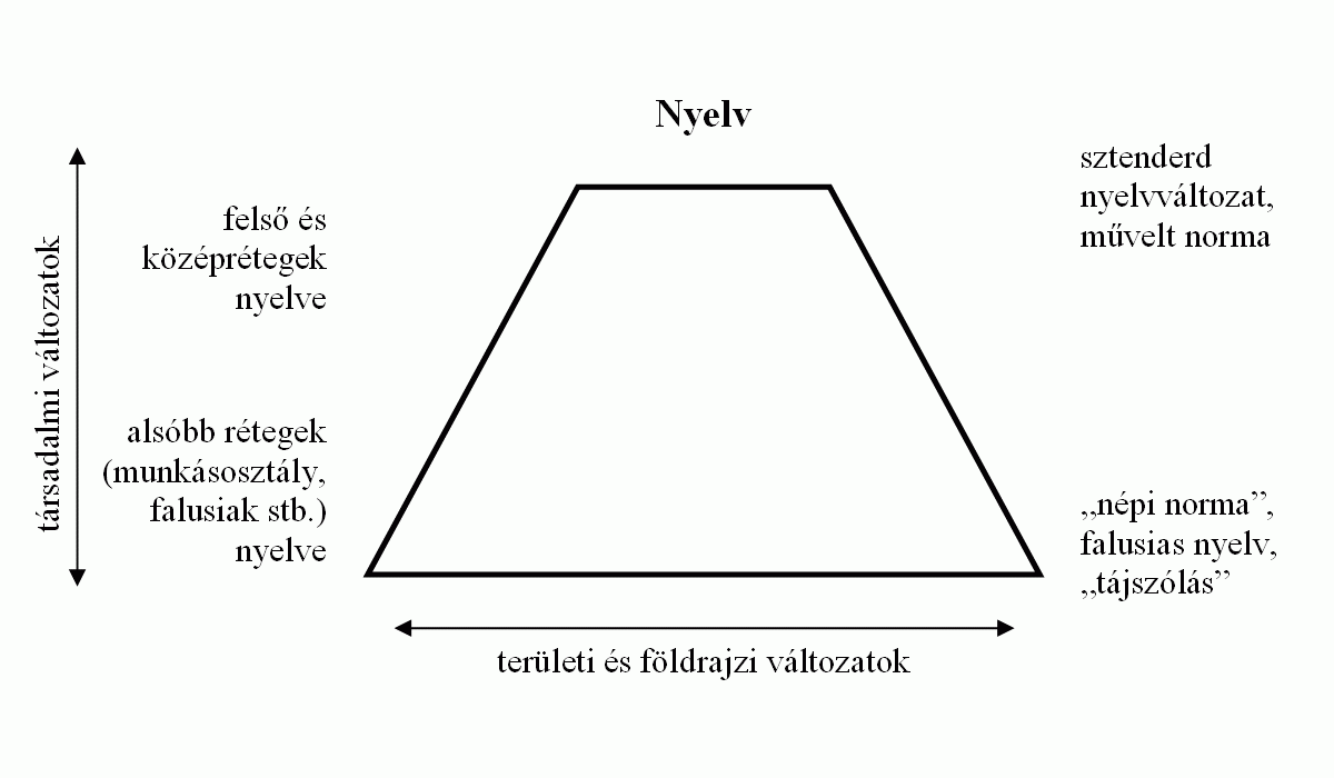 A nyelvváltozatok (dialektusok és szociolektusok) kapcsolatát ábrázoló „nyelvpiramis”. Készült Manuel Alvar Manual de dialectología hispánica – El Español de España (Ariel, Barcelona, 2007) című kötete 39. oldalán lévő ábra alapján